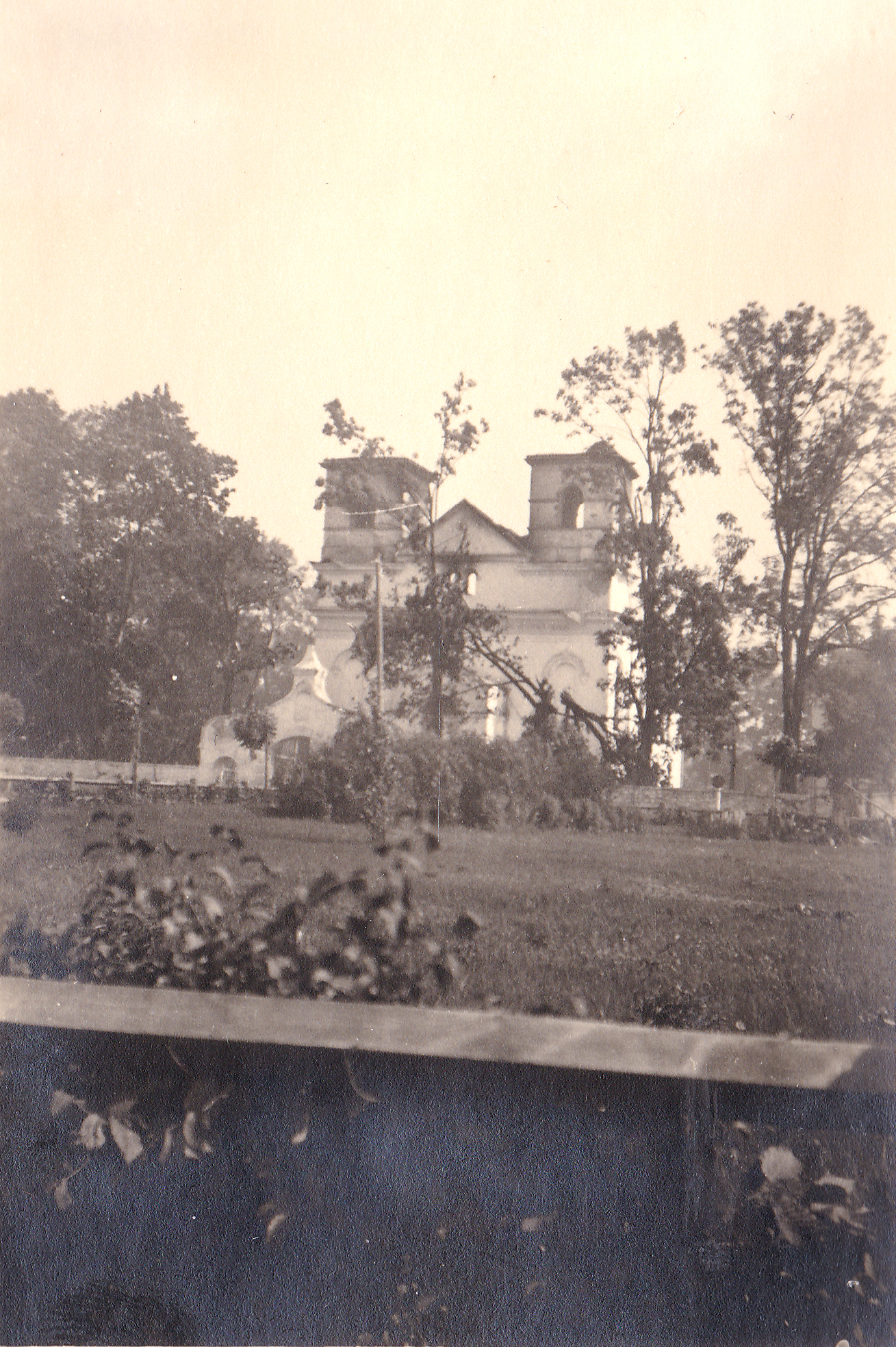 Беларуская (тарашкевіца): Боцькі (Boćki). Царква Прачыстай Багародзіцы